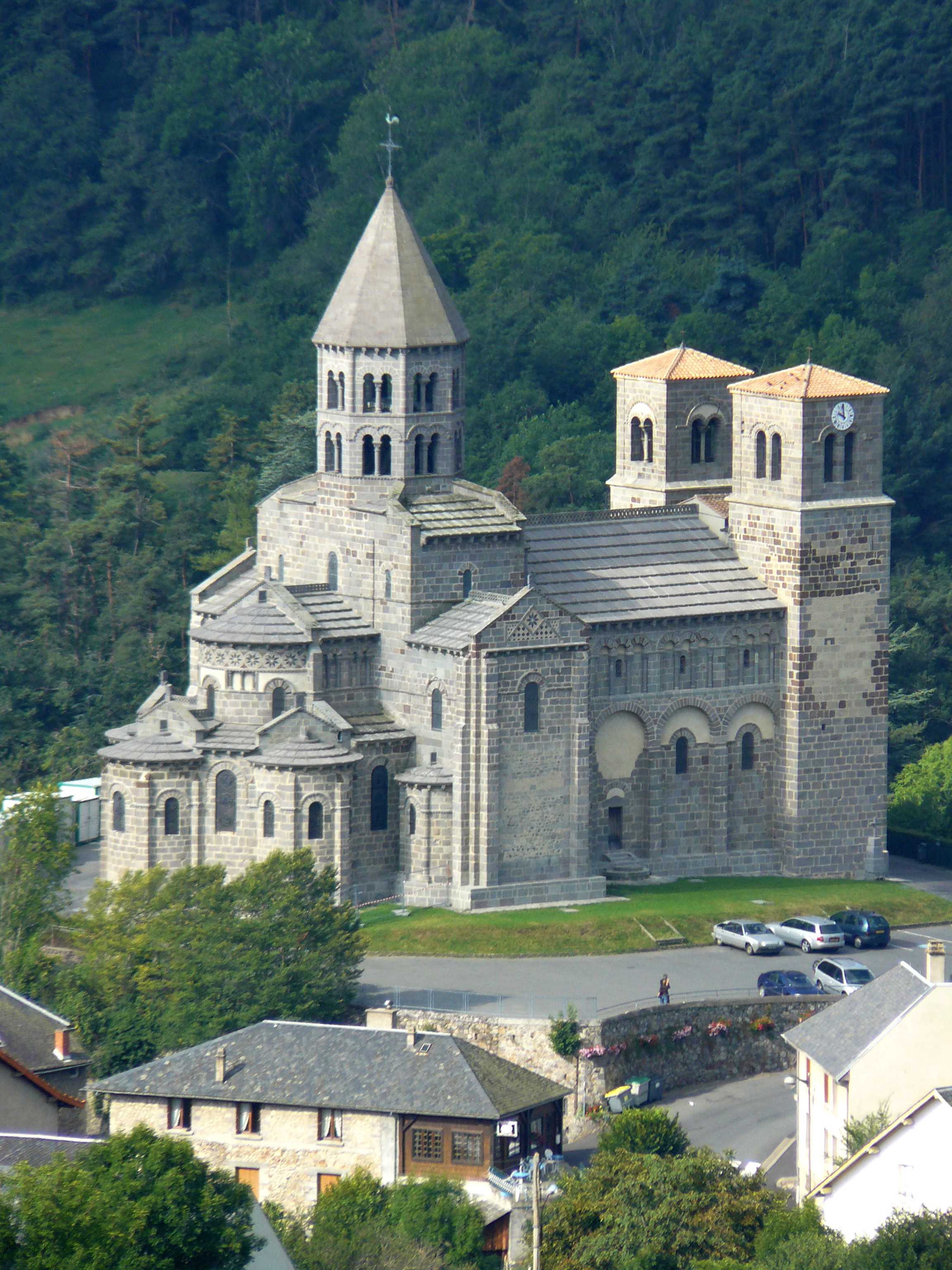 Église Notre-Dame-du-Mont-Cornadore de Saint-Nectaire (Puy-de-Dôme)